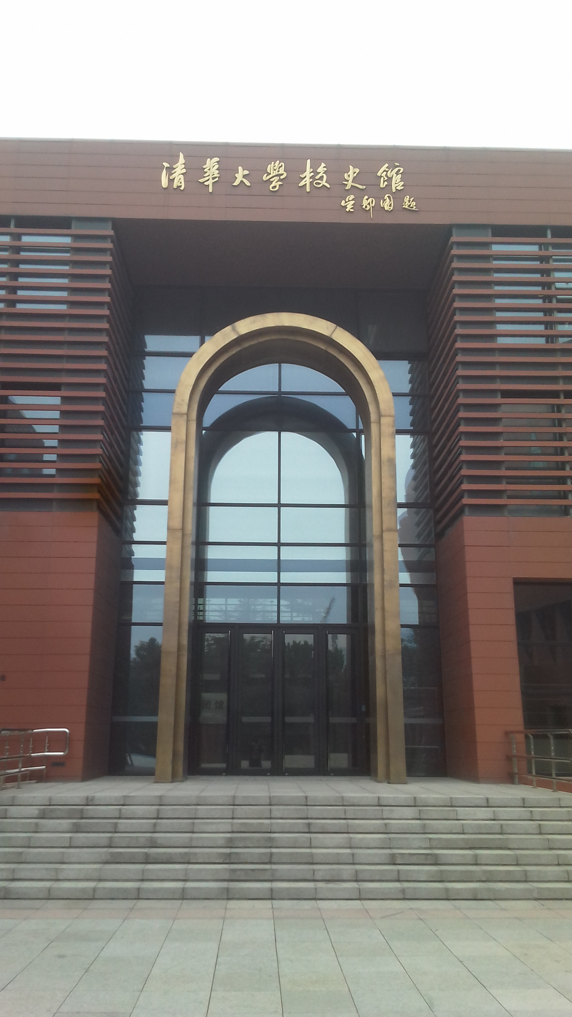 清華大學校史館